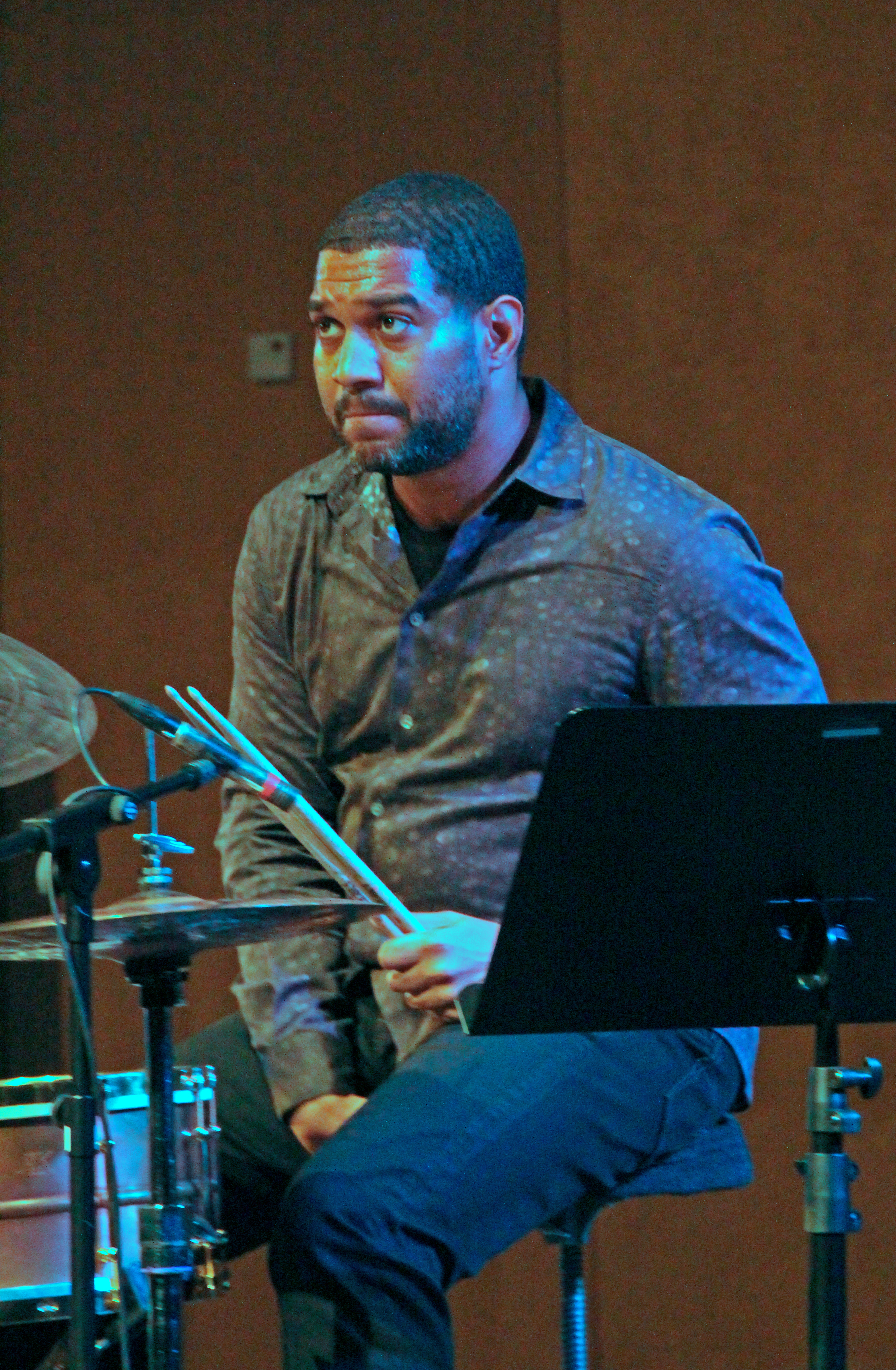 Bildinhalt: Der Schlagzeuger Damion Reid bei einem Auftritt des Mark Turner Quartet in Frankfurt am Main Aufnahmeort: Frankfurt am Main, Deutschland Die dargestellte Person wurde bei einem öffentlichen Auftritt fotografiert.